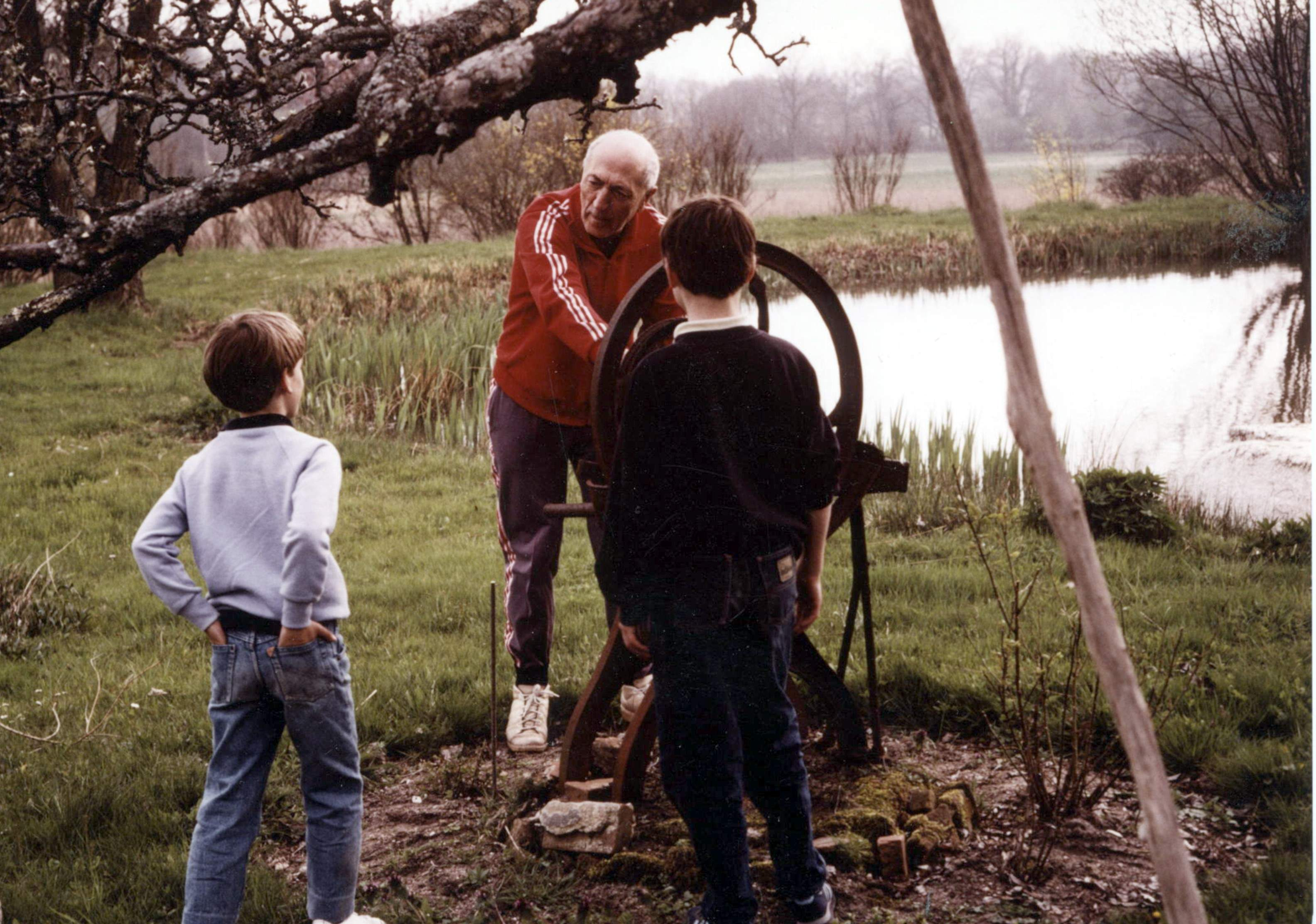 photographie de Jean Lescure (1912-2005), poète et écrivain d'art, en 1986.